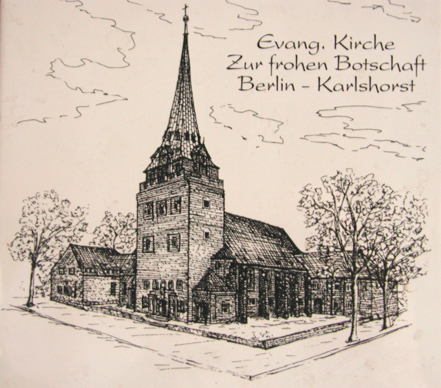 Alte Ansicht auf einer Kachel in der Küsterei